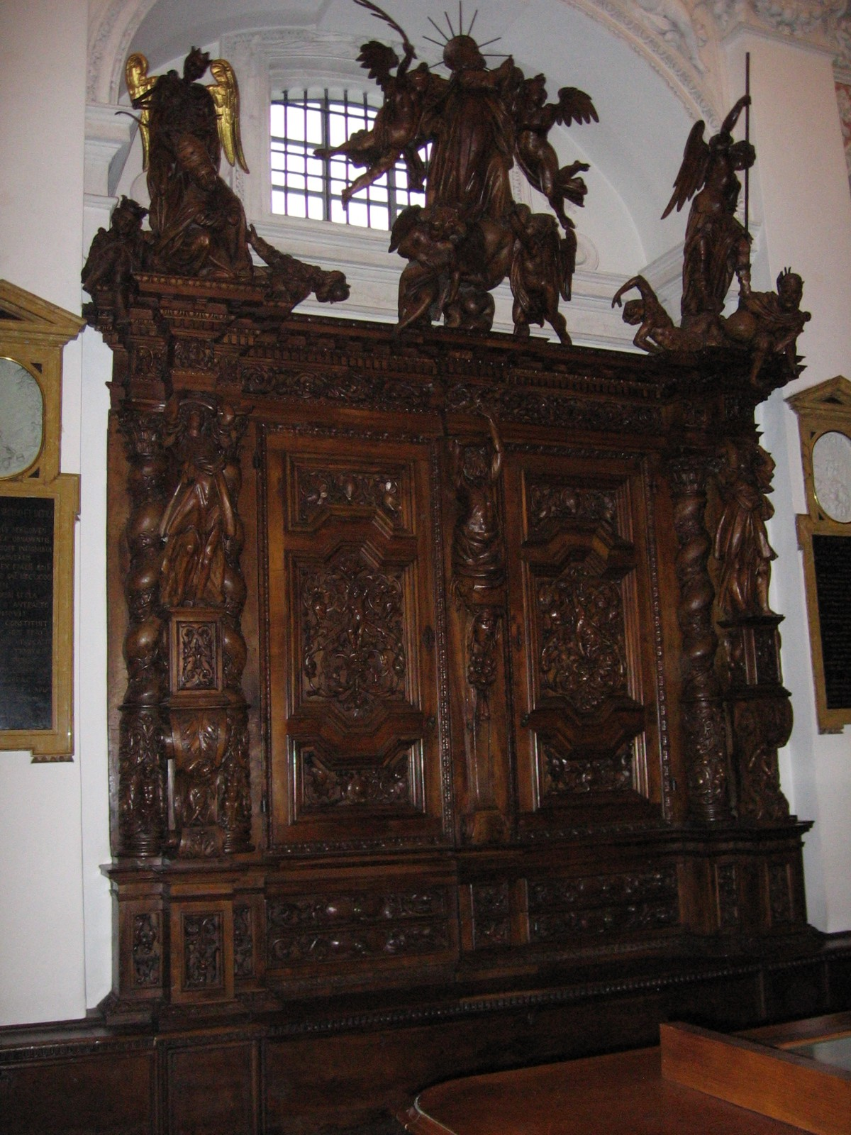 Museo le Sagrestie, Alzano Lombardo, BG (ITALIA)